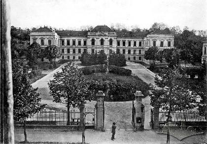 Колишня будівля медичного відділу Львівського університету. Вулиця Пекарська.